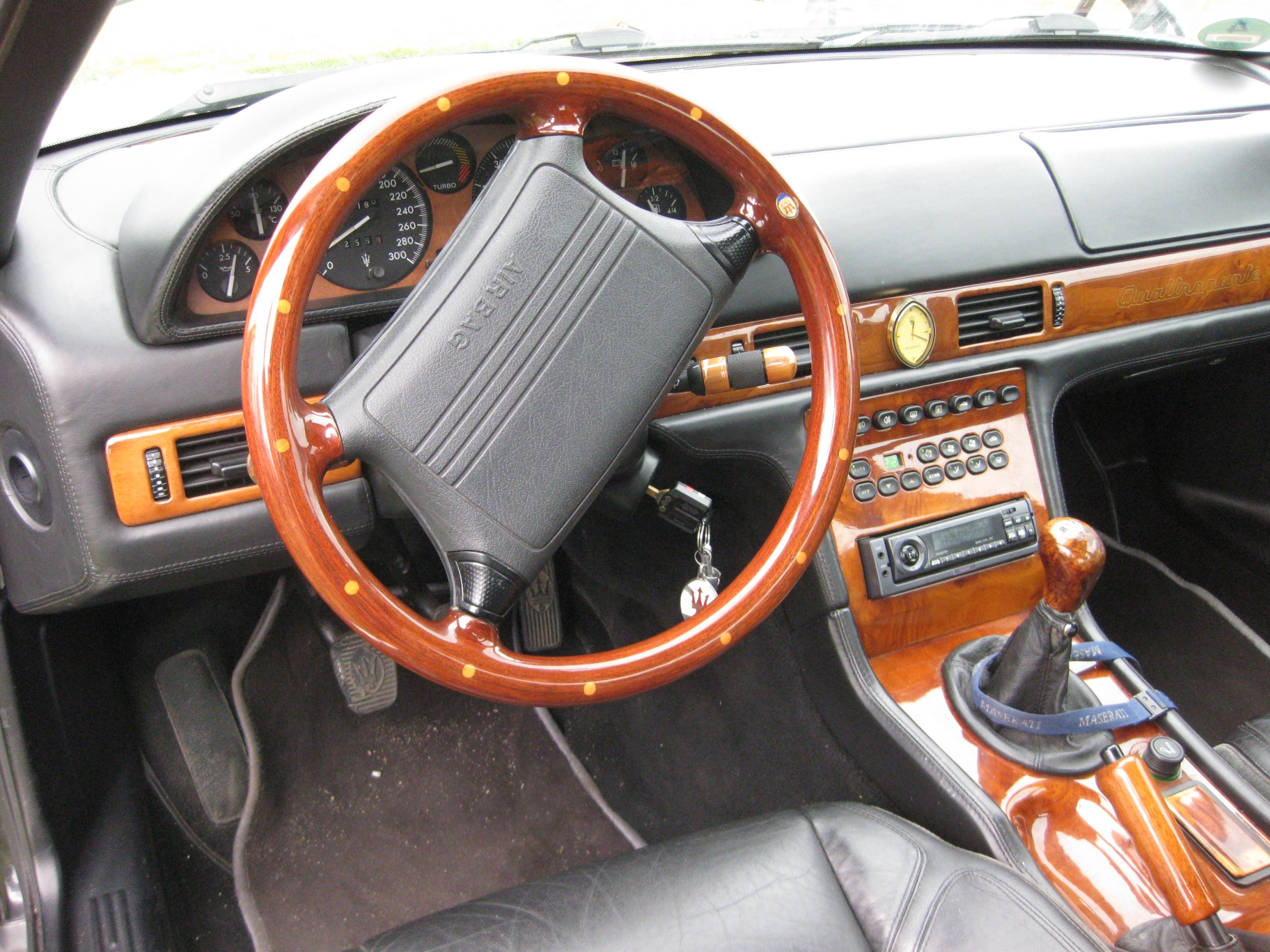 Maserati Quattroporte IV Cockpitansicht